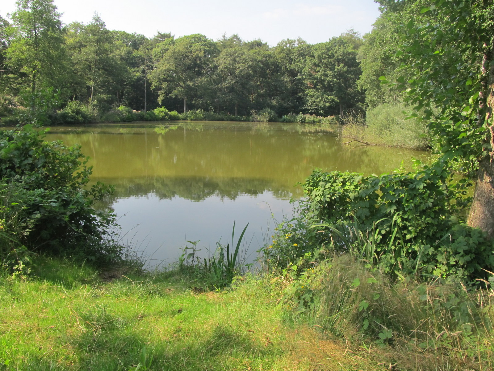 2012-08-15 in Zonienwoud